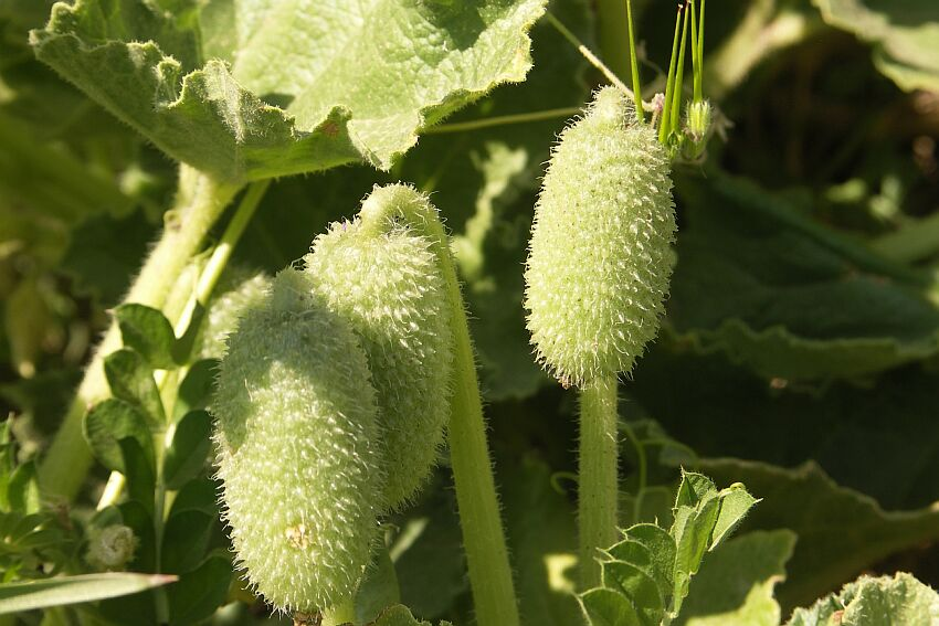 Spritzgurke (Ecballium elaterium), Rhodes